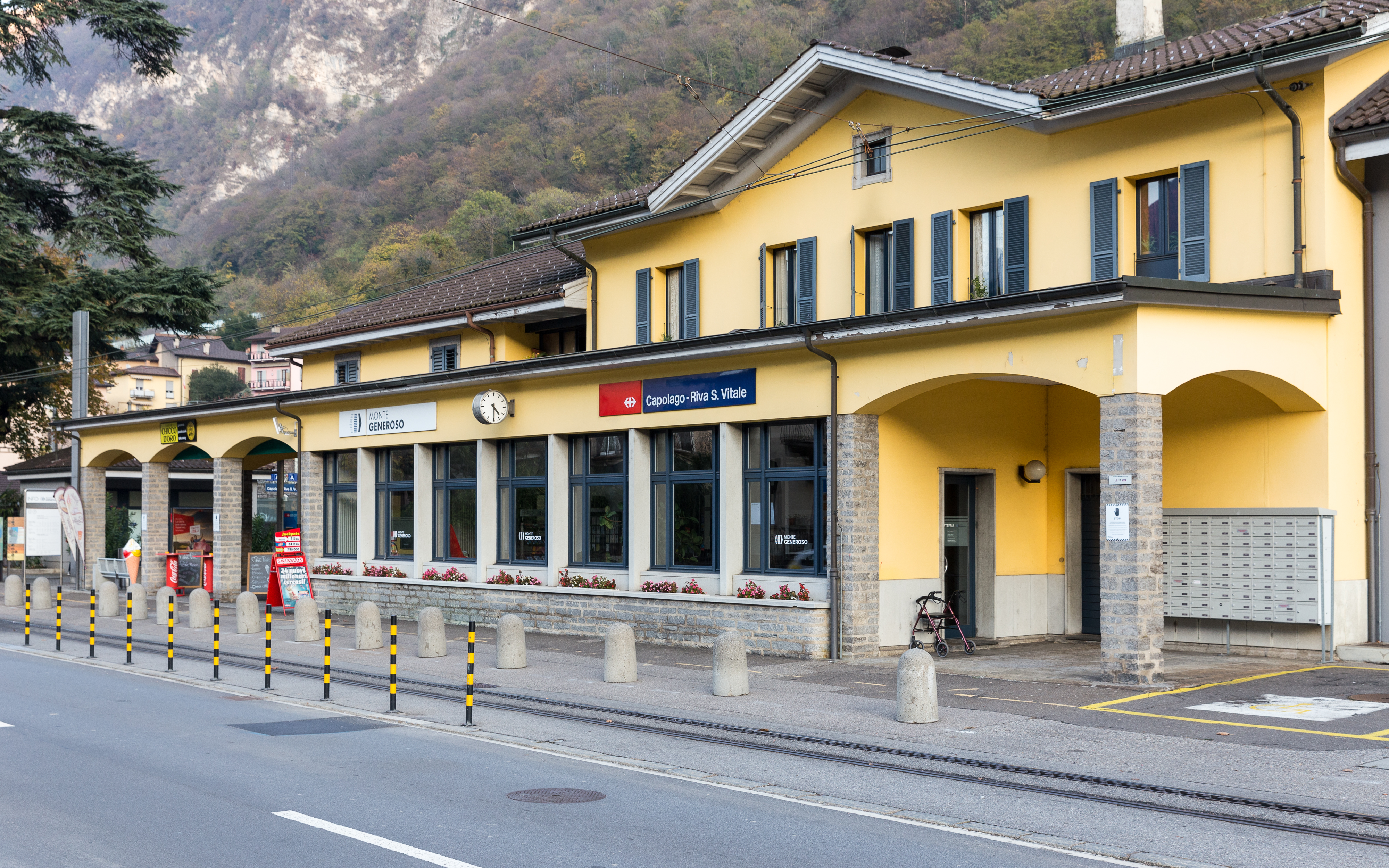 Capolago-Riva S. Vitale train station (2017)